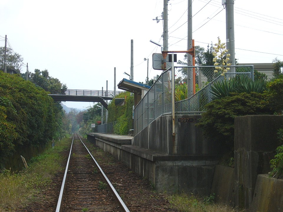 予讃線高野川駅 線路を渡る畦道から撮影